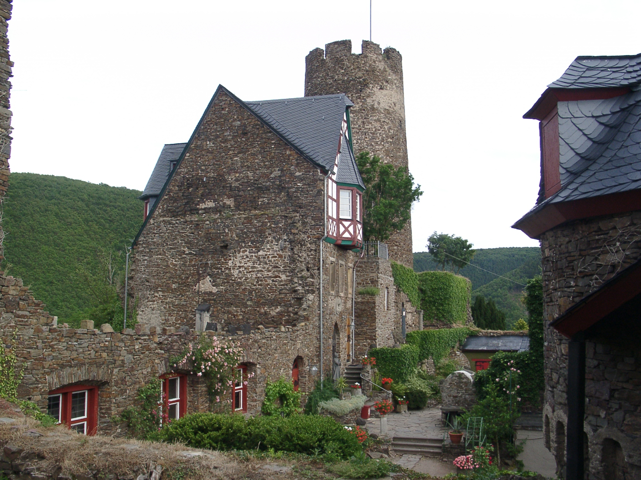 Burg Thurant mit Trierer Turm